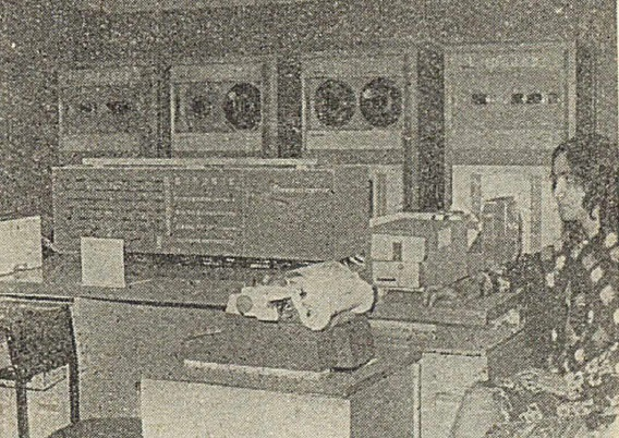 NAIRI 3-3